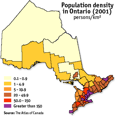 Densidad de población en Ontario en 2001. Fuente: The Atlas of Canada. Mapa realizado por mí basado en el mapa Image:District-tier-ontario.png, del usuario Earl Andrew